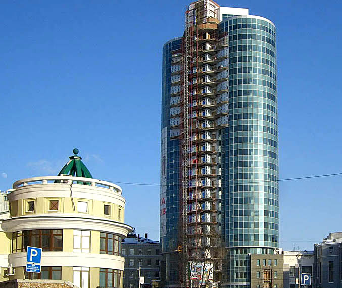 Новосибирск. Бизнес-центр "Кобра"